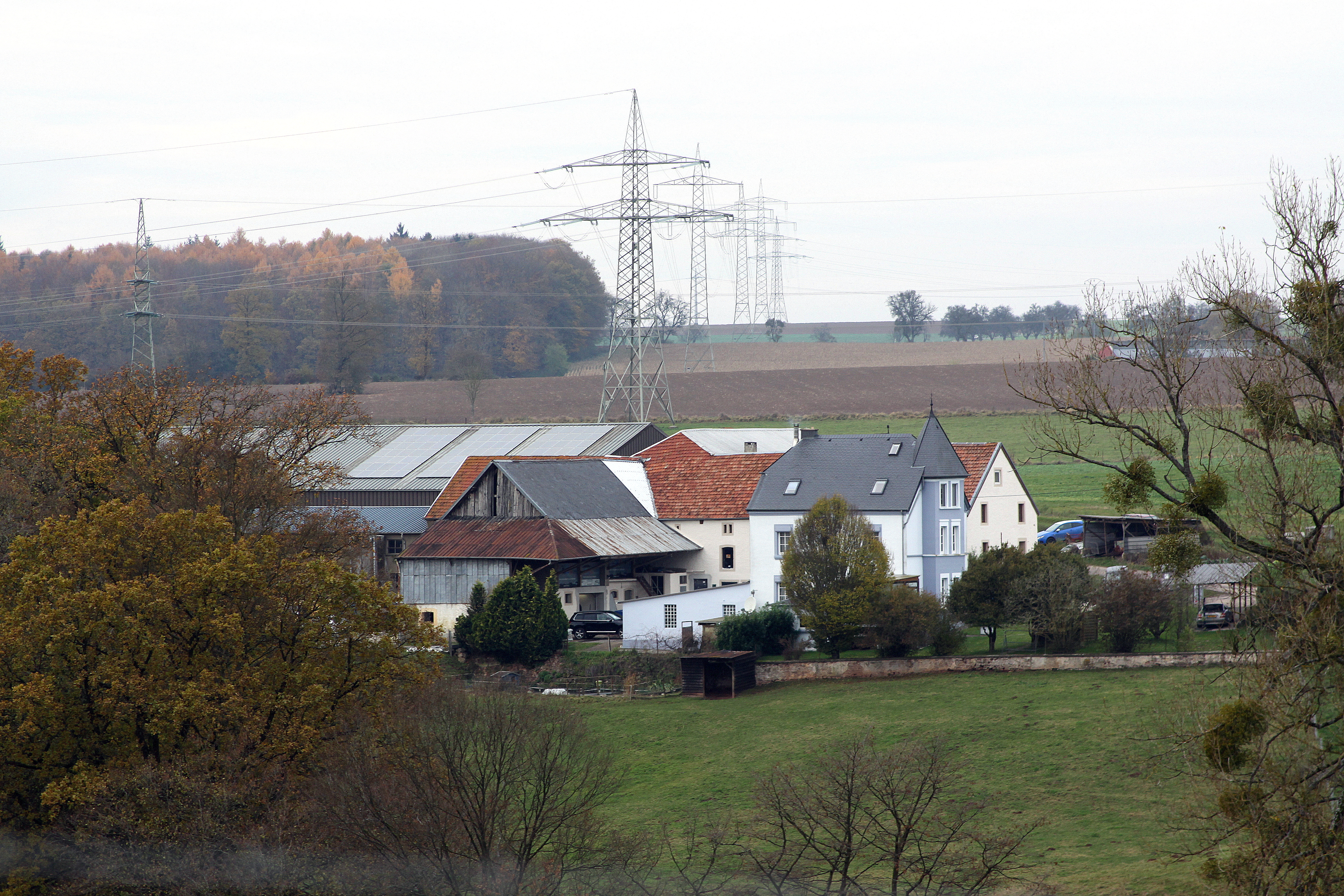 De Klenge Buerghaff (November 2012)